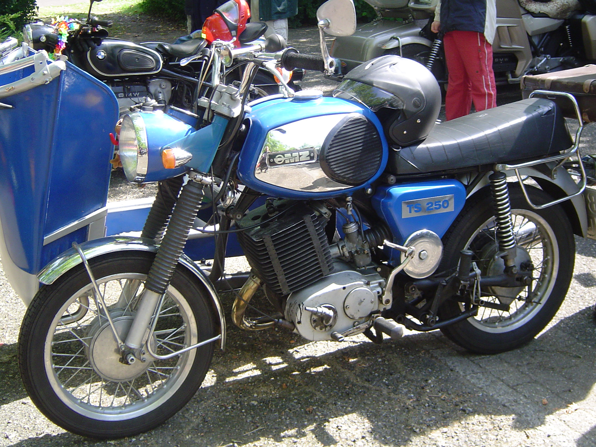 MZ TS 250/0 zijspancombinatie met een MZ ETZ 250 Motorblok en ETZ 251 cilinder gemonteerd.